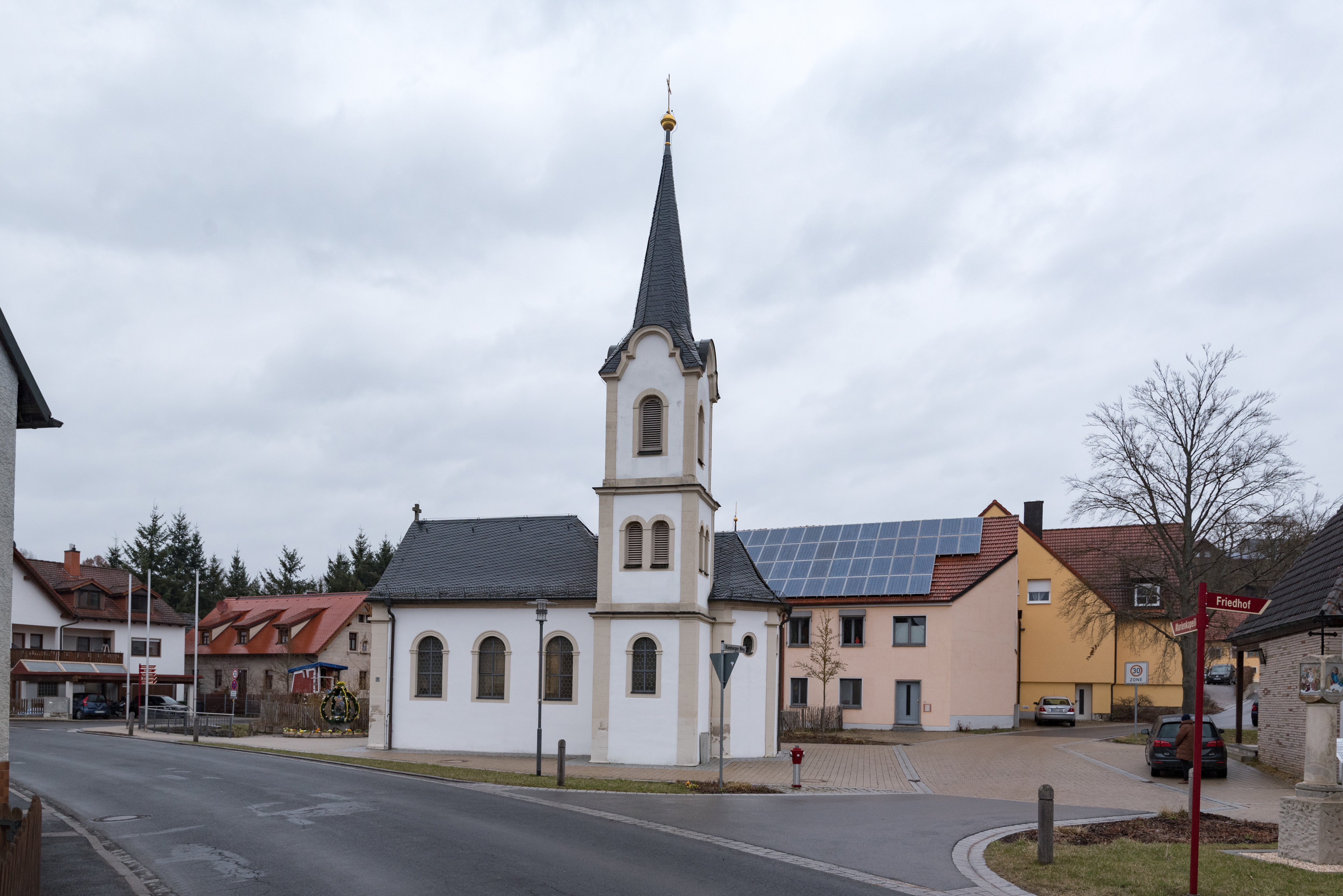 Priesendorf , Hauptstraße 20